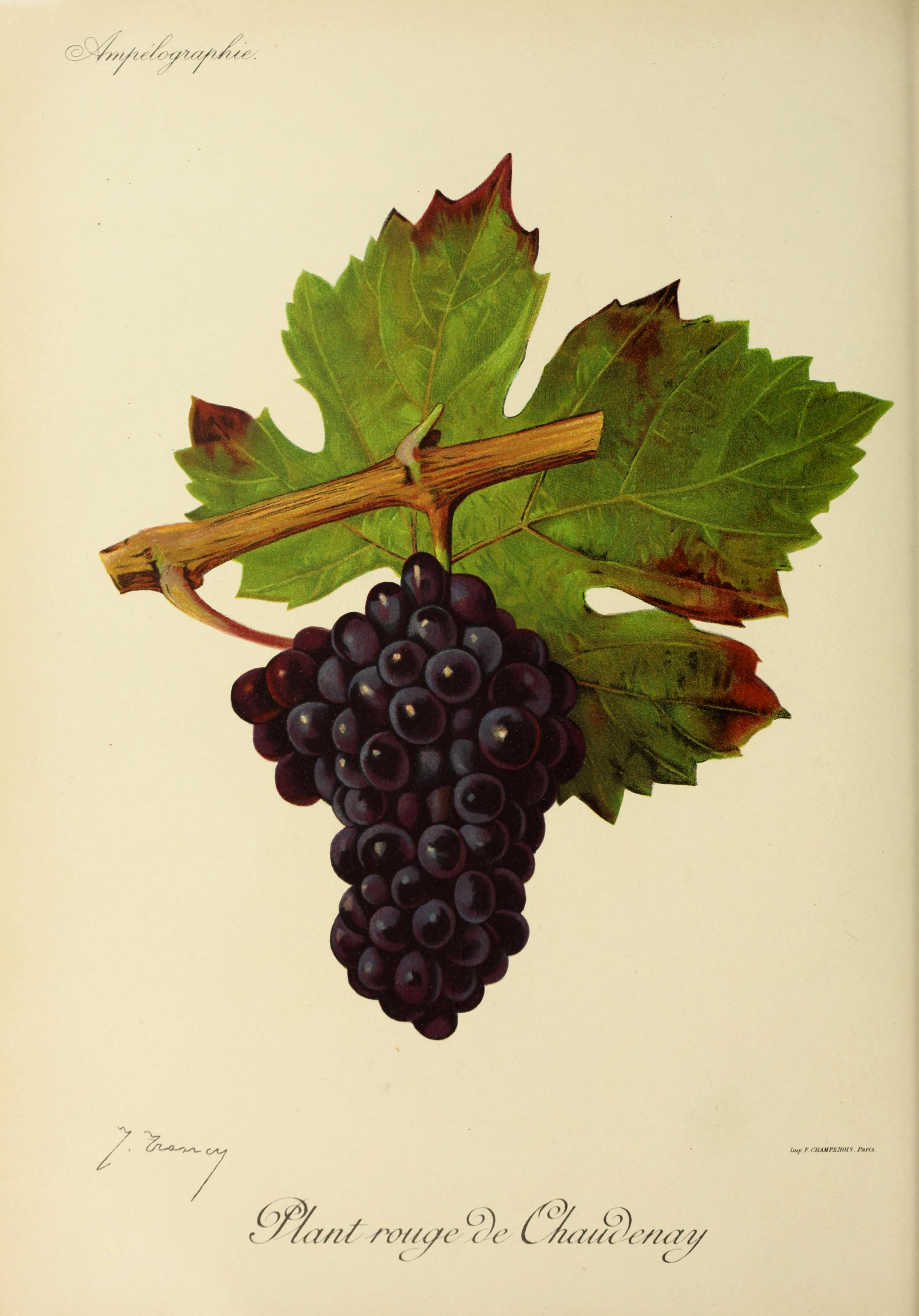 Illustration du cépage Plant rouge de Chaudenay par Jules Troncy dans l'ouvrage "Ampélographie : traité général de viticulture" publié sous la direction de P. Viala & V. Vermorel avec la collaboration de A. Bacon, A. Barbier, A. Berget [et al.] - Date de l'édition originale : 1901-1910